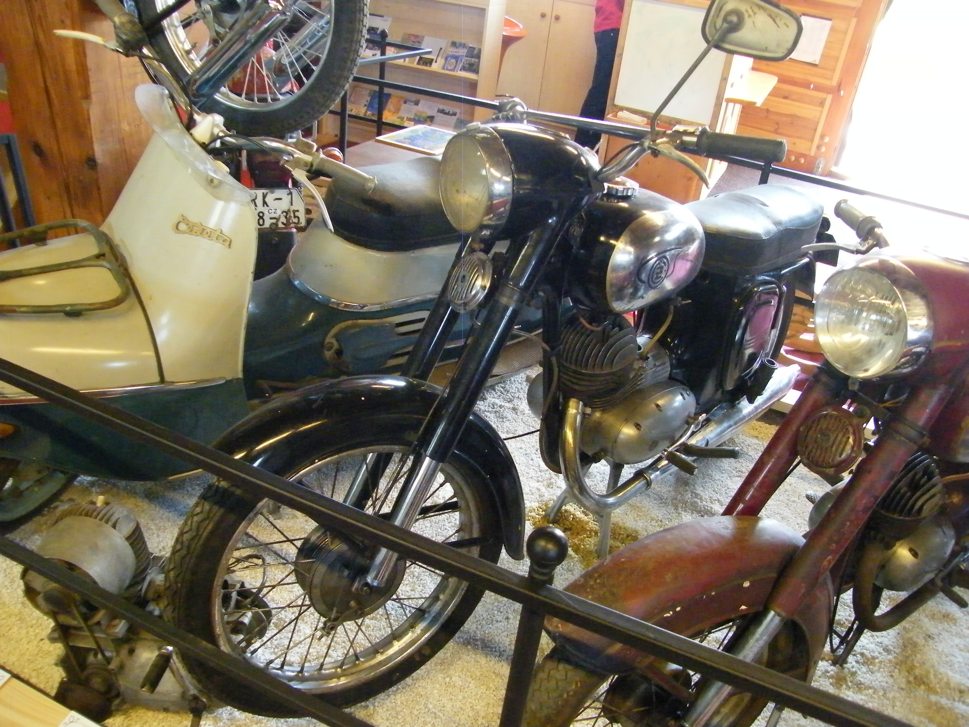 ČZ 125/473 Sport (1963)